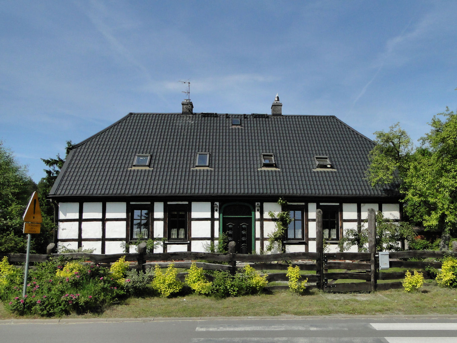 Szczecin Jezierzyce